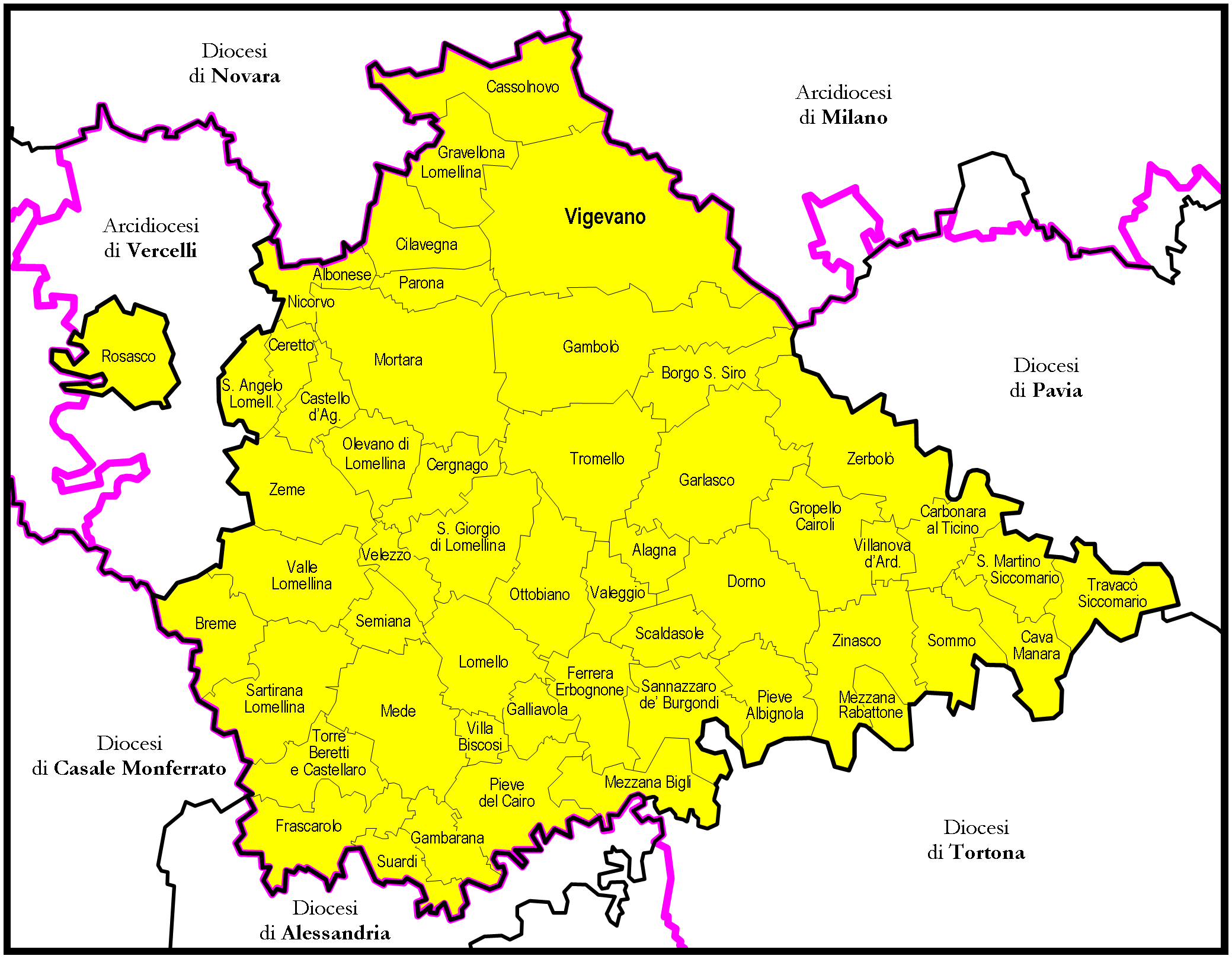 Mappa della Diocesi di Vigevano